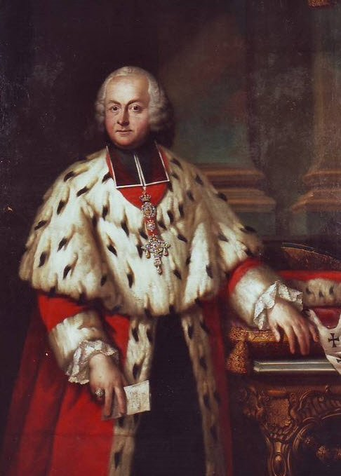 Emmerich Joseph von Breidbach zu Bürresheim (regierte 1763-1774), Erzbischof und Kurfürst von Mainz, zeitgenössisches Gemälde